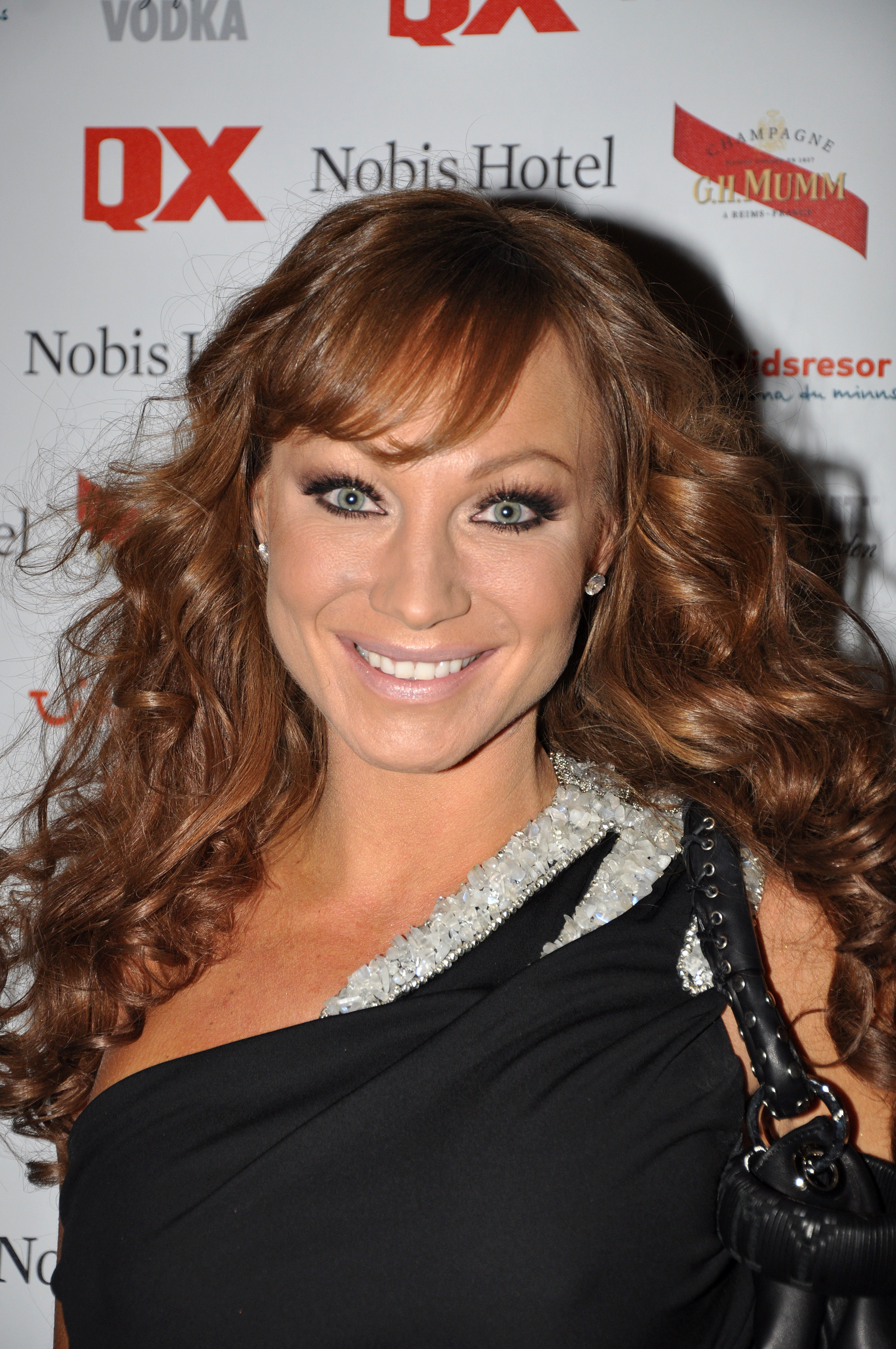 Gaygalan 2011 Charlotte Perrelli